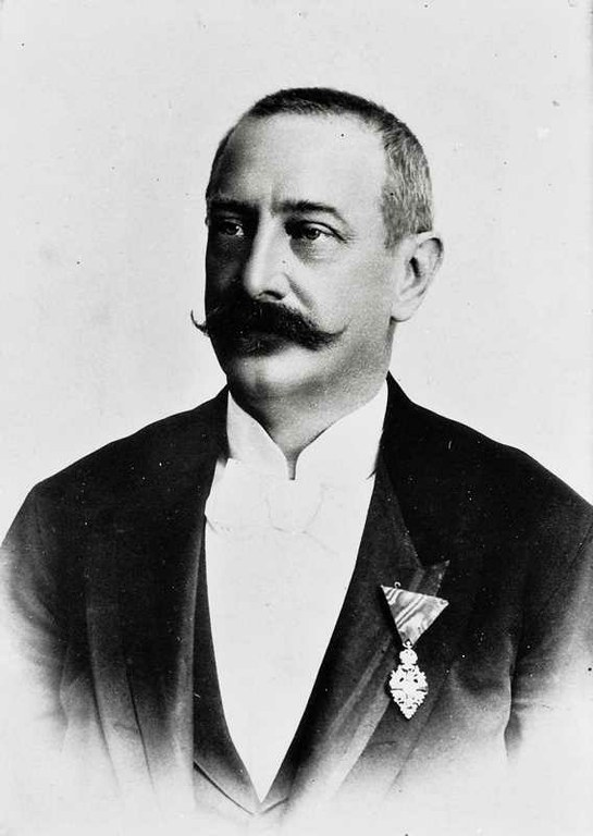 Adalbert Johanny (1846 - 1919), Moravskoslezský politik.